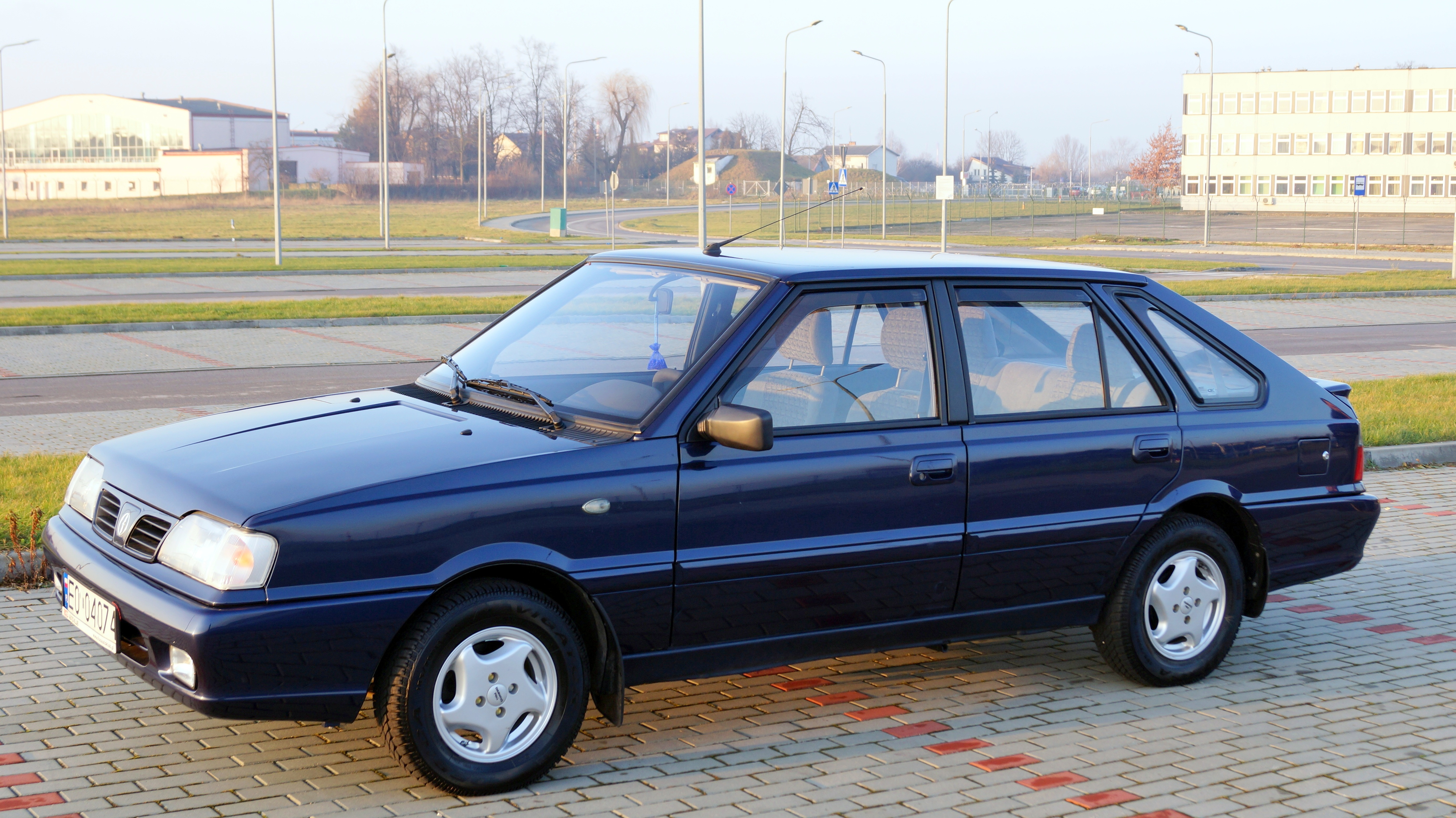 Daewoo-FSO Polonez Caro Plus z 2001 roku.